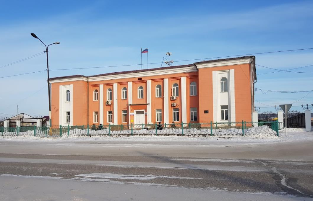 Администрация Аларского района. Фото: Александр Матвеенко.